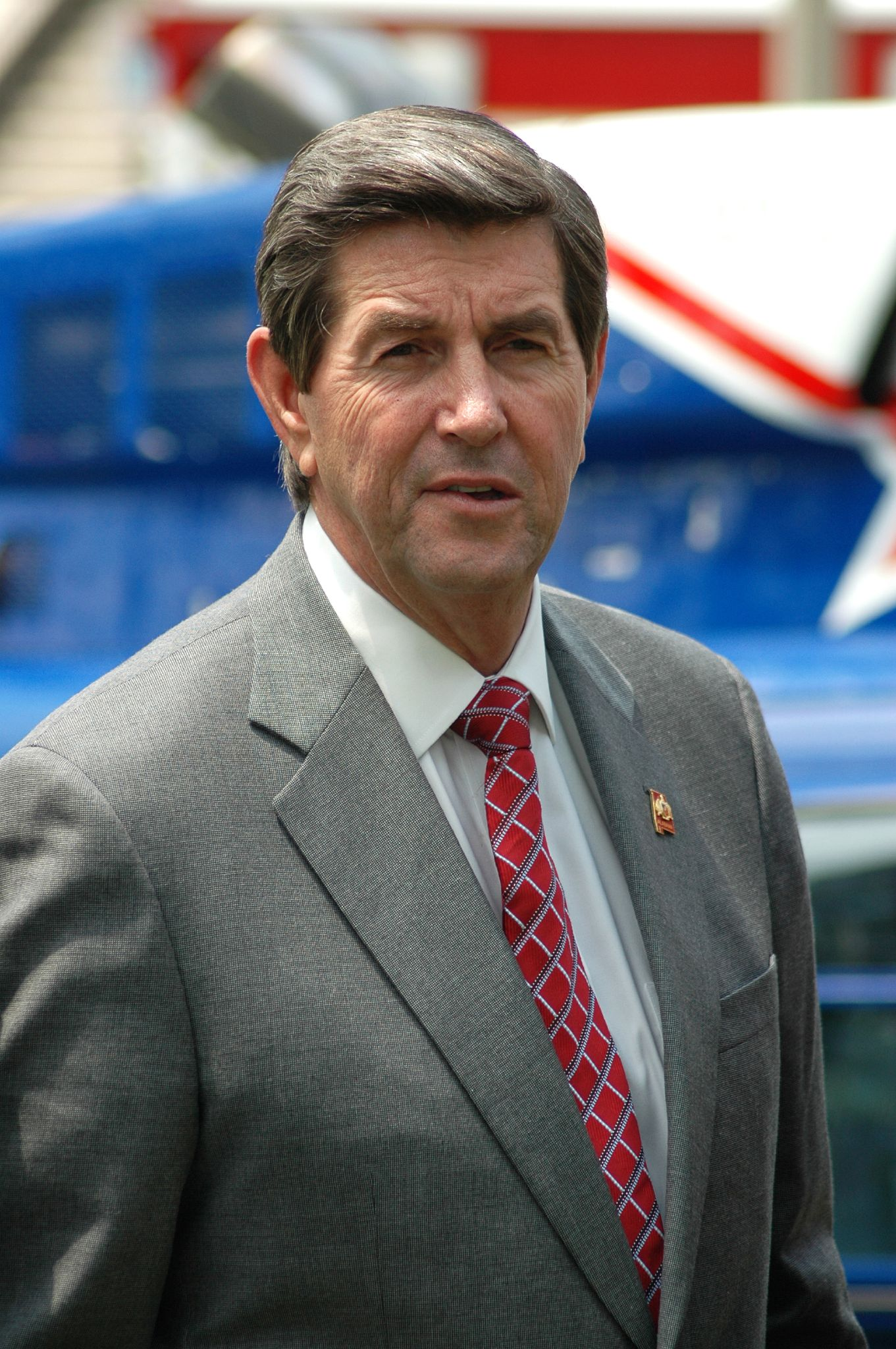 Bob Riley